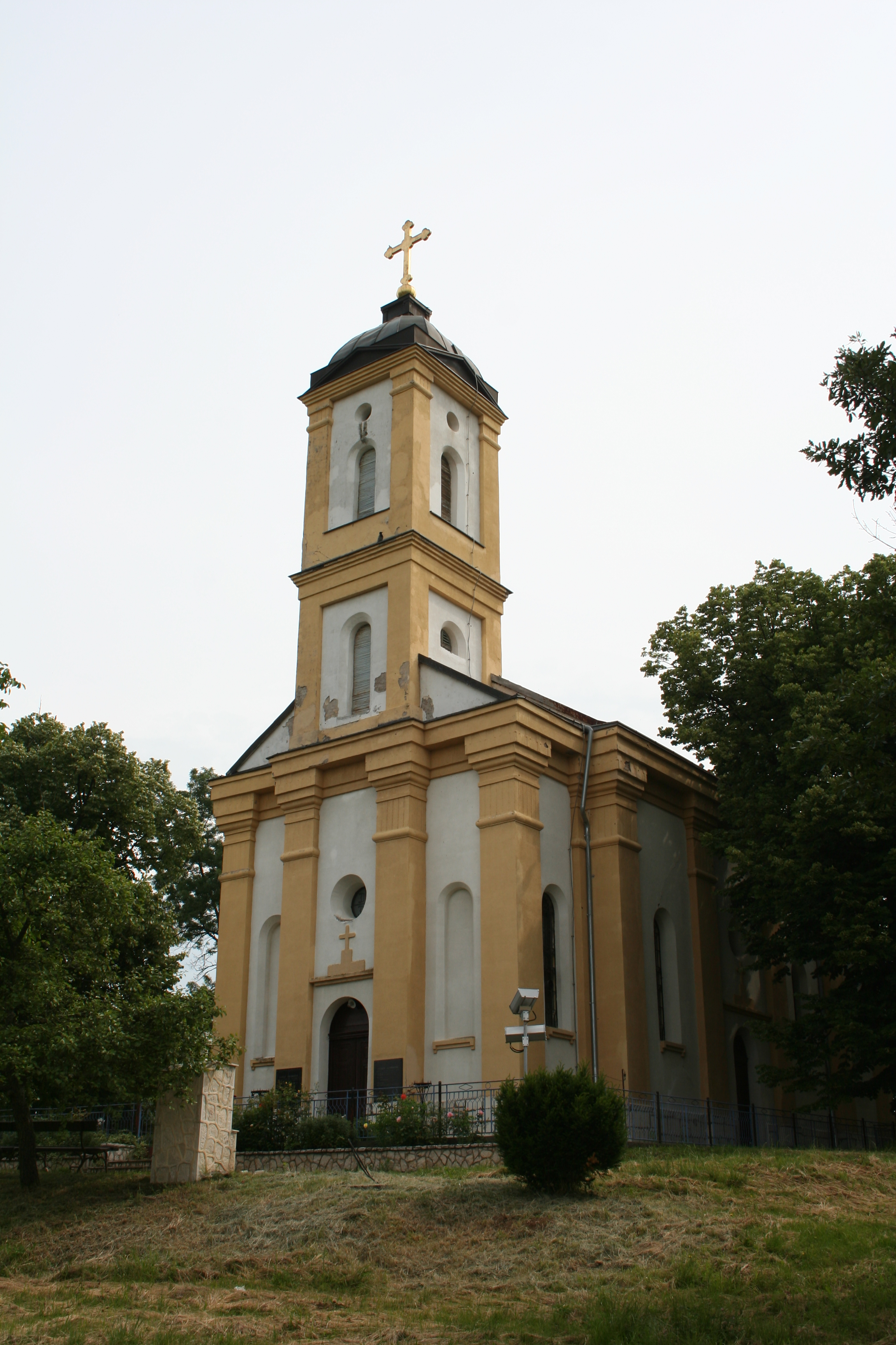 Crkva Svetog apostola Luke, Jalovik